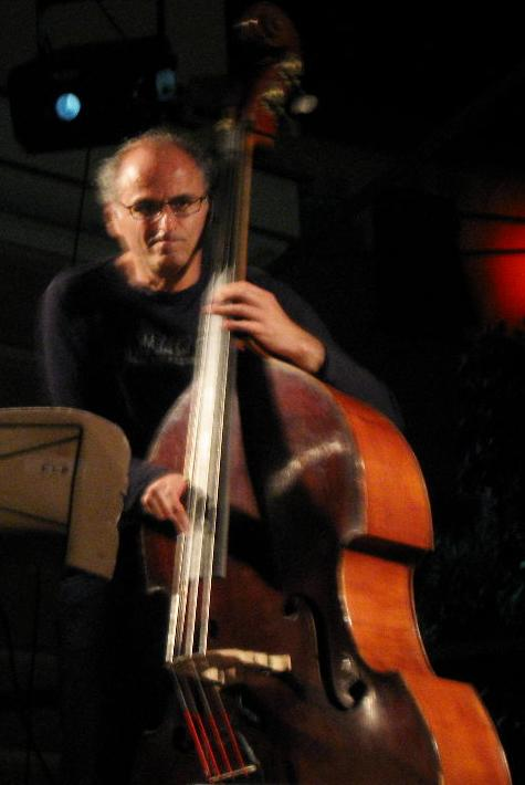 Michel Benita at Sori Jazz 2008